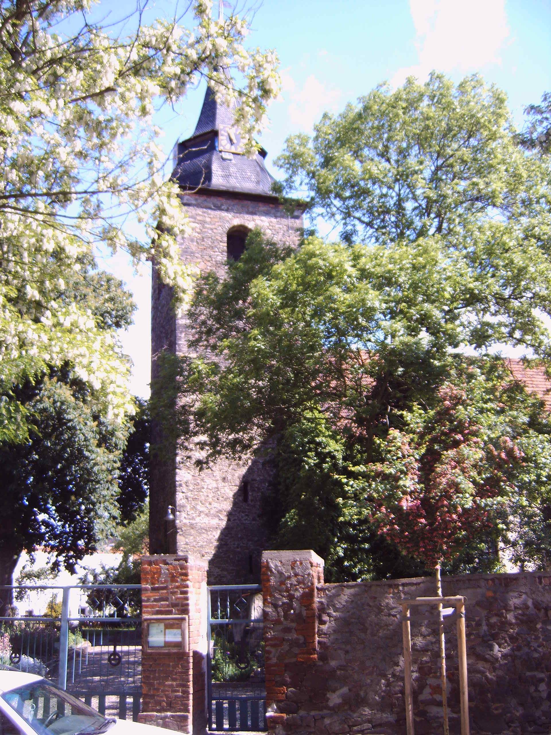 Kirche in Barleben, Sachsen-Anhalt, Deutschland Bild aufgenommen am 7.6.2006